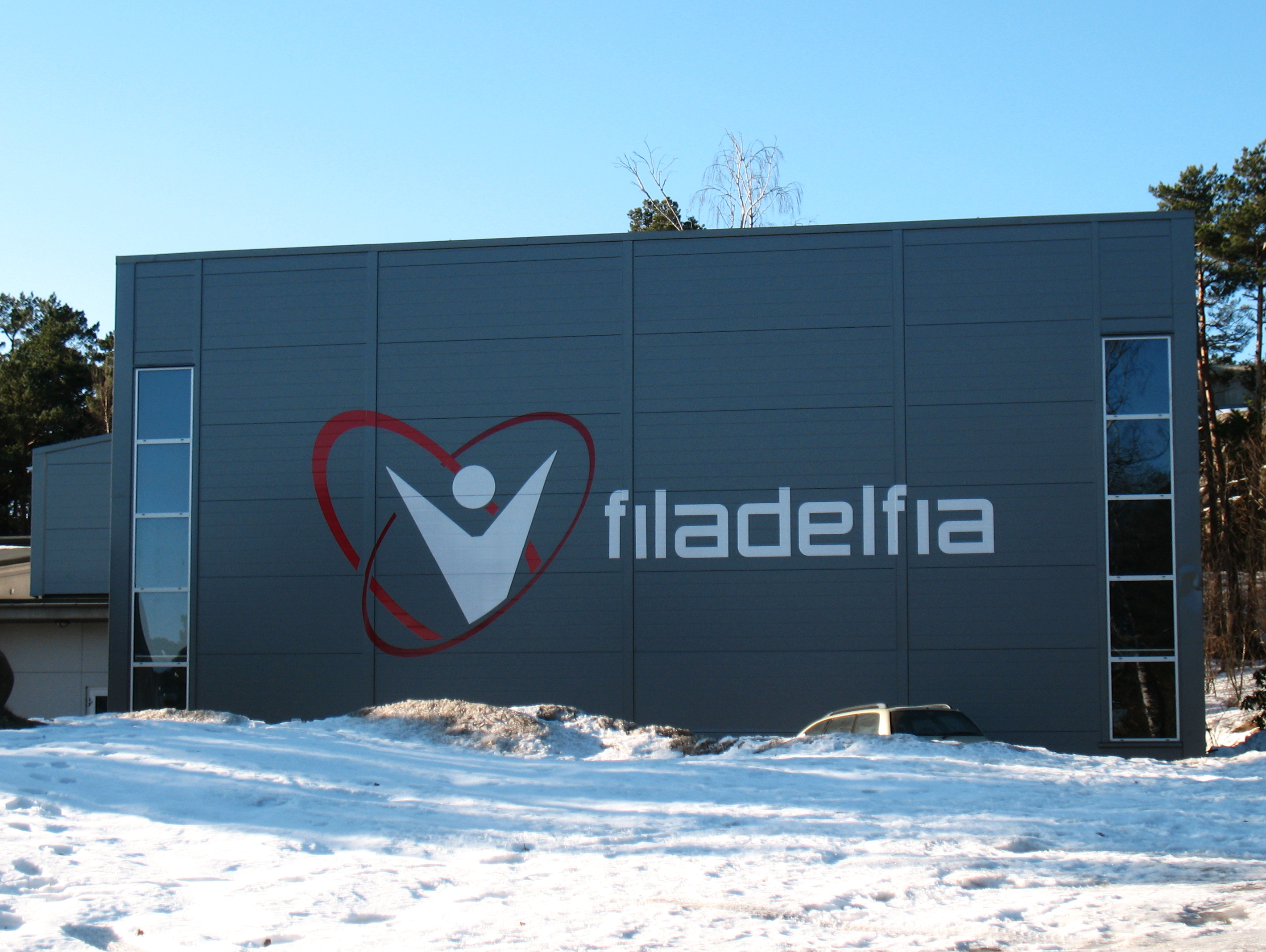 Filadelfia Kristiansands menighetslokaler i Marviksveien 140.